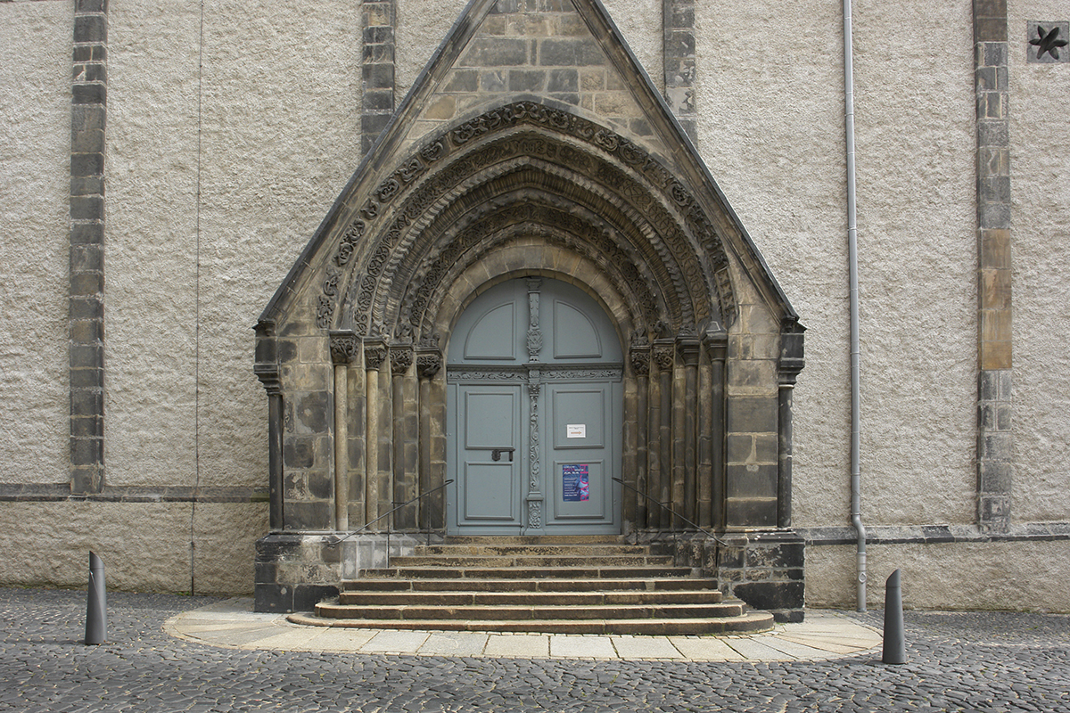 Görlitz, Peterskirche, Romanischer Eingang